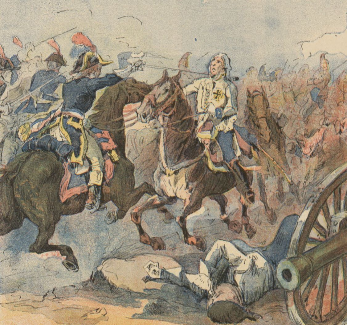 En 1794, au combat de Juliers [Jülich], le 12e dragons reprend plusieurs picès enlevées par l'ennemi ; le chef de brigade Pagès tue de sa main un général autrichien.